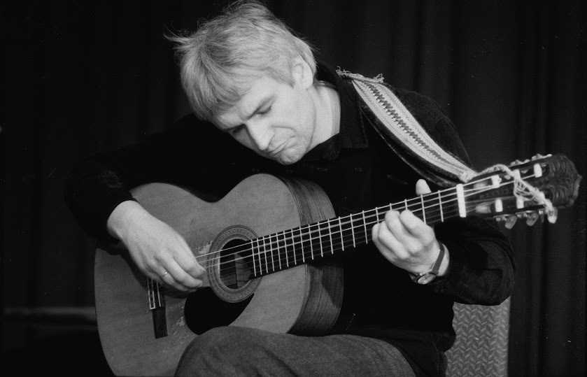 Leipziger Liederszene, Joachim Schäfer, Foto: Jochen Janus